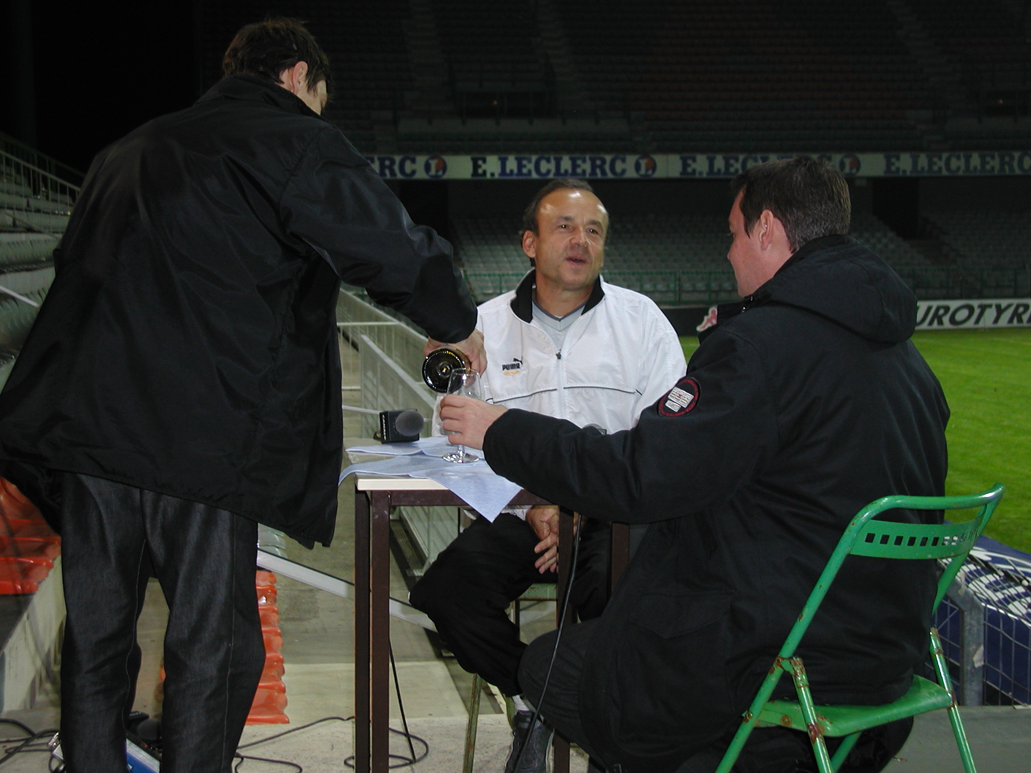 Gernot Rohr, en 2002, entraîneur de l'O.G.C.Nice